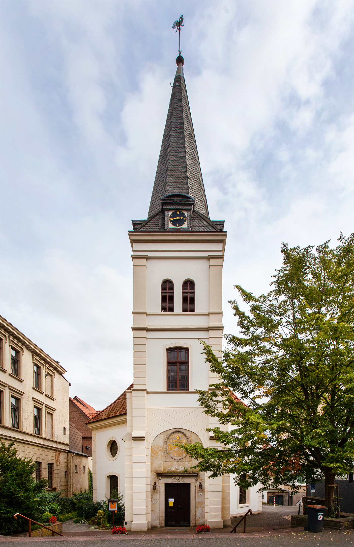 St. Johannis Kirche in Vlotho This is the photograph of an architectural monument. It is part of the list of cultural monuments of Vlotho, no. 67